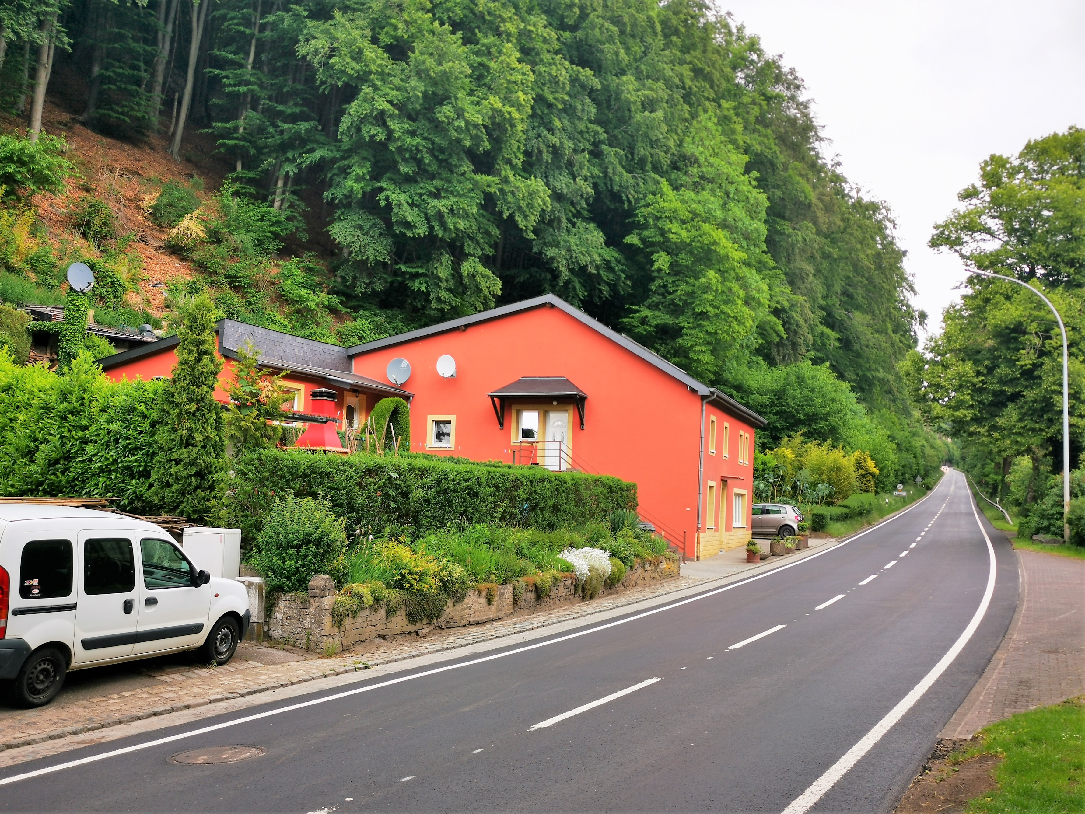 Luxembourg. Lieu-dit Bënzert (Binzrath), commune de Mersch.